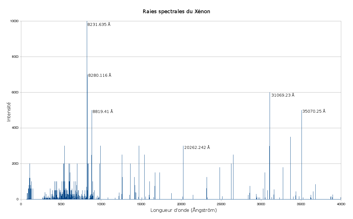 Raies spectrales du Xénon. Créé avec Calc, Bless et The Gimp d'après Handbook of Chemistry & Physics